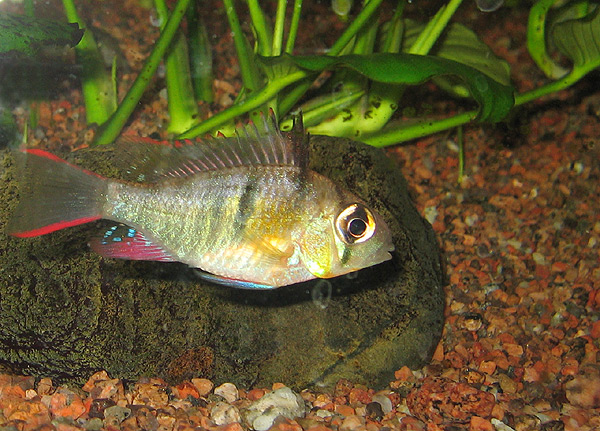 Bolivian Ram (Mikrogeophagus altispinosus)